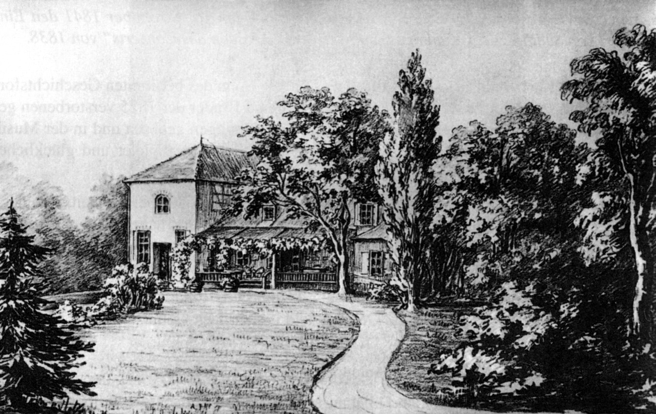 Das Landhaus Karl von Schlözers in Lübeck, Keimzelle von Karlshof (Lübeck). Ölbild eines unbekannten Malers nach einer zur Goldenen Hochzeit 1857 geschaffenen Lithographie Luise von Schlözers (1823–1907).